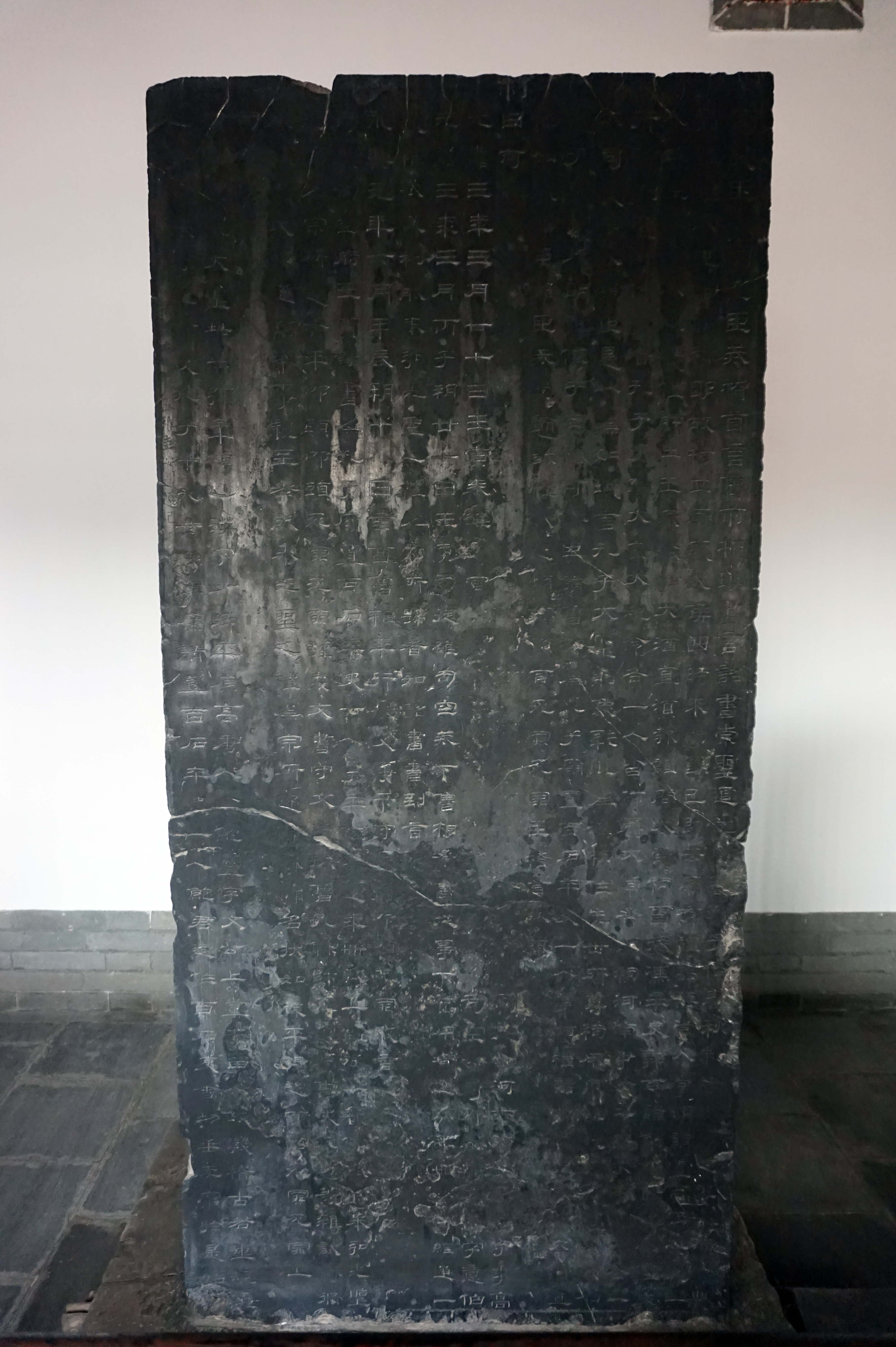 汉乙瑛碑。